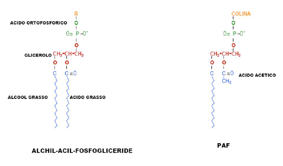 creazione personale Categoria:Immagini di chimica